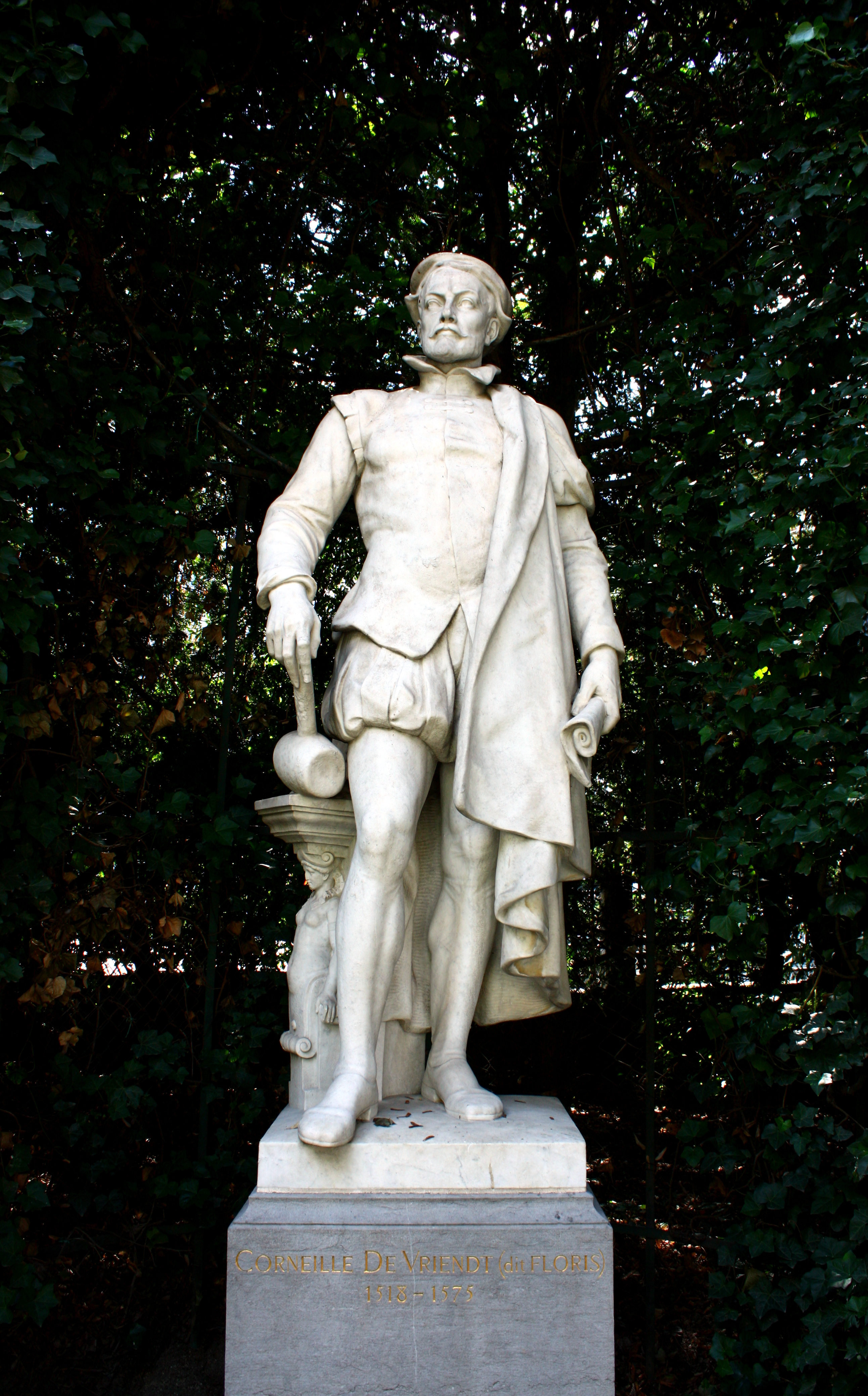 Statue de Corneille De Vriendt (dit Floris) dans le square du Petit Sablon à Bruxelles. Fait partie du lot classé n°2043-0031/0